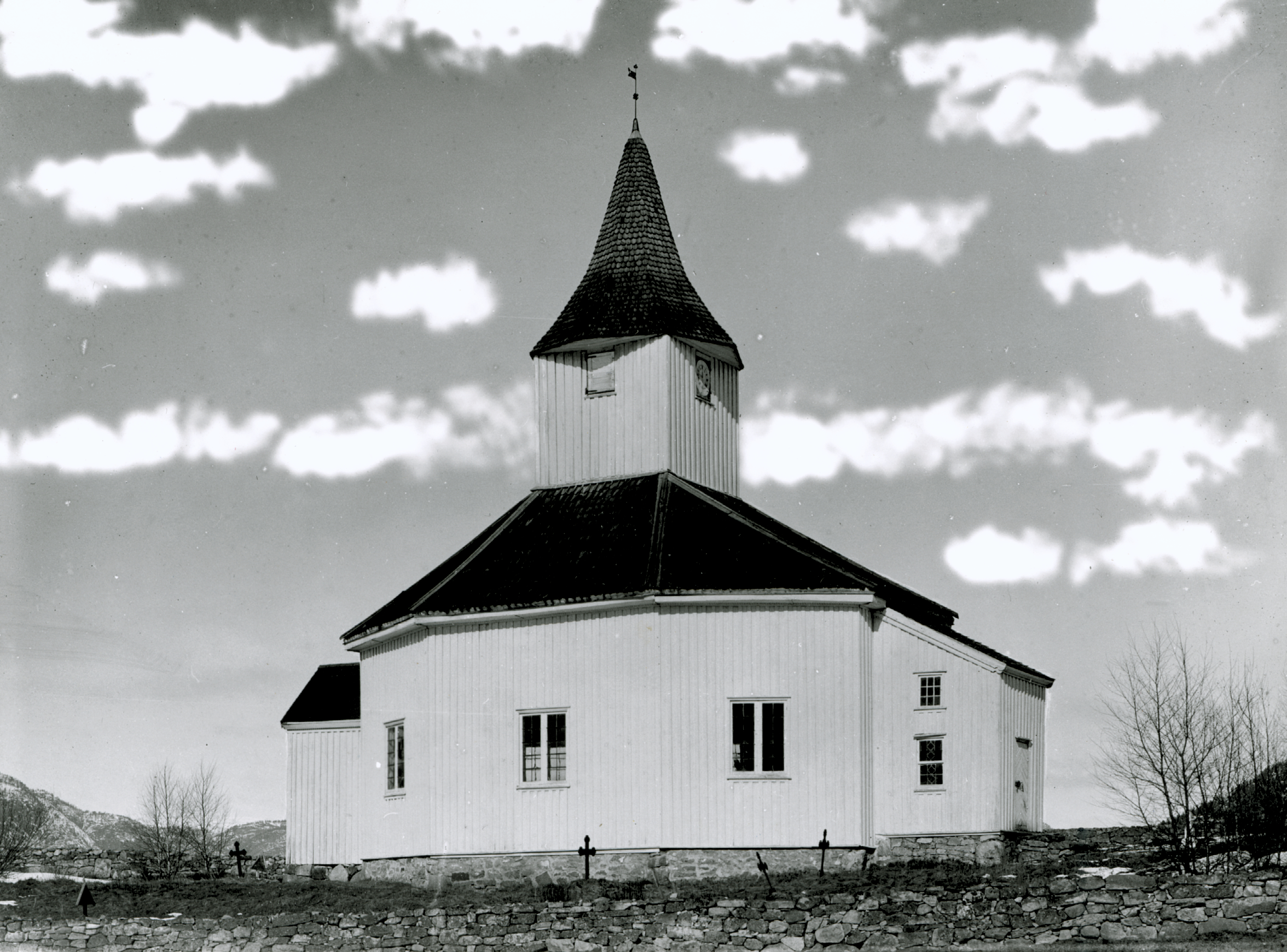 Årdal kirke i Bygland, Aust-Agder